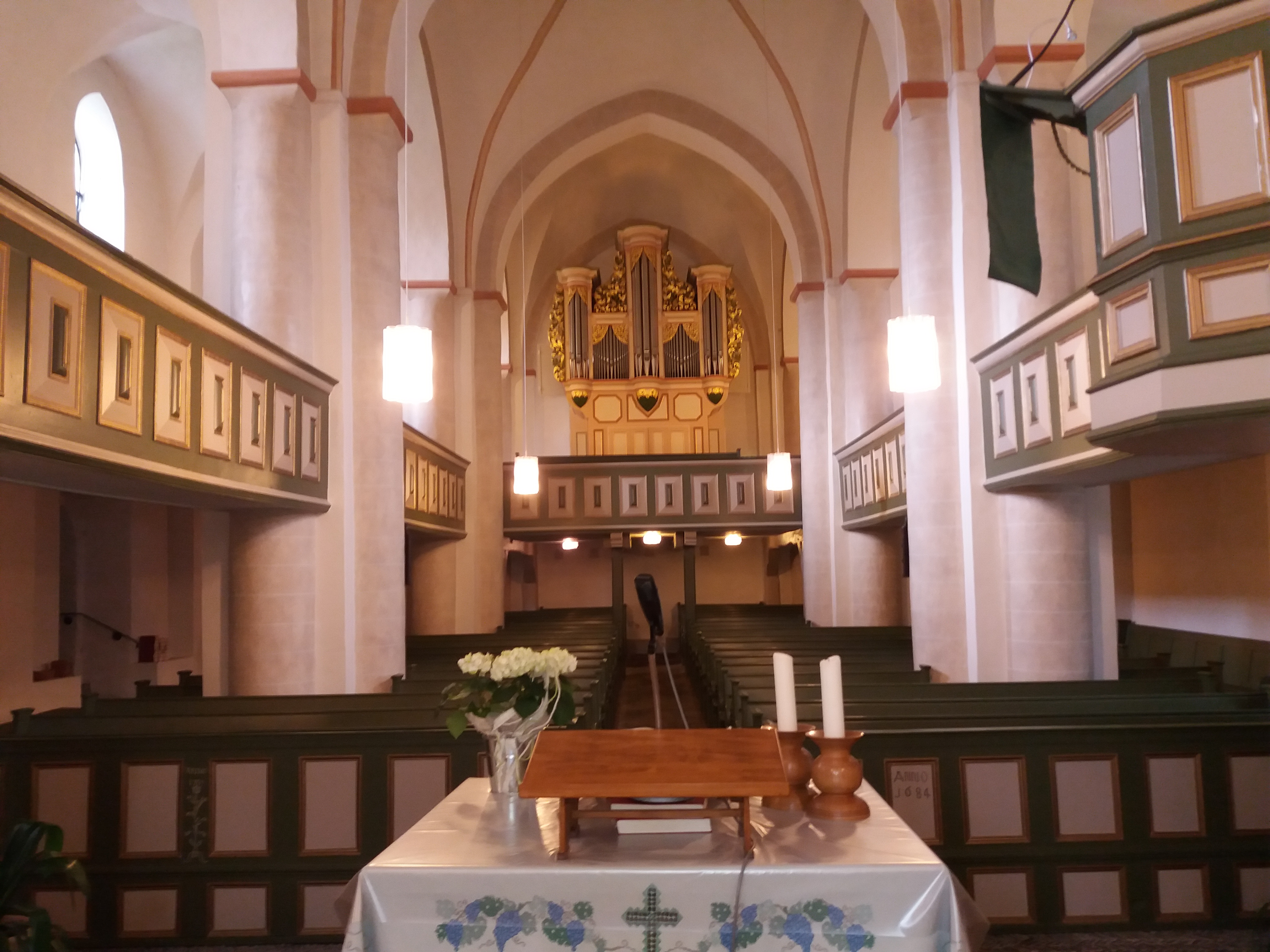 Kirche Feudingen vom Alter aus mit Sicht auf die Orgel